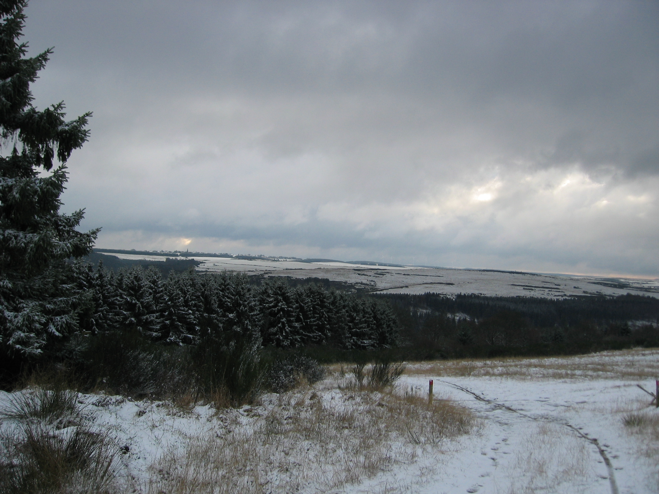 Dreiborner Hochfläche im Dezember 2009, die Ortschaft Dreiborn im Horizont.